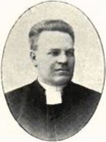 Karl August Ehrengren (1854-1938), svensk präst.